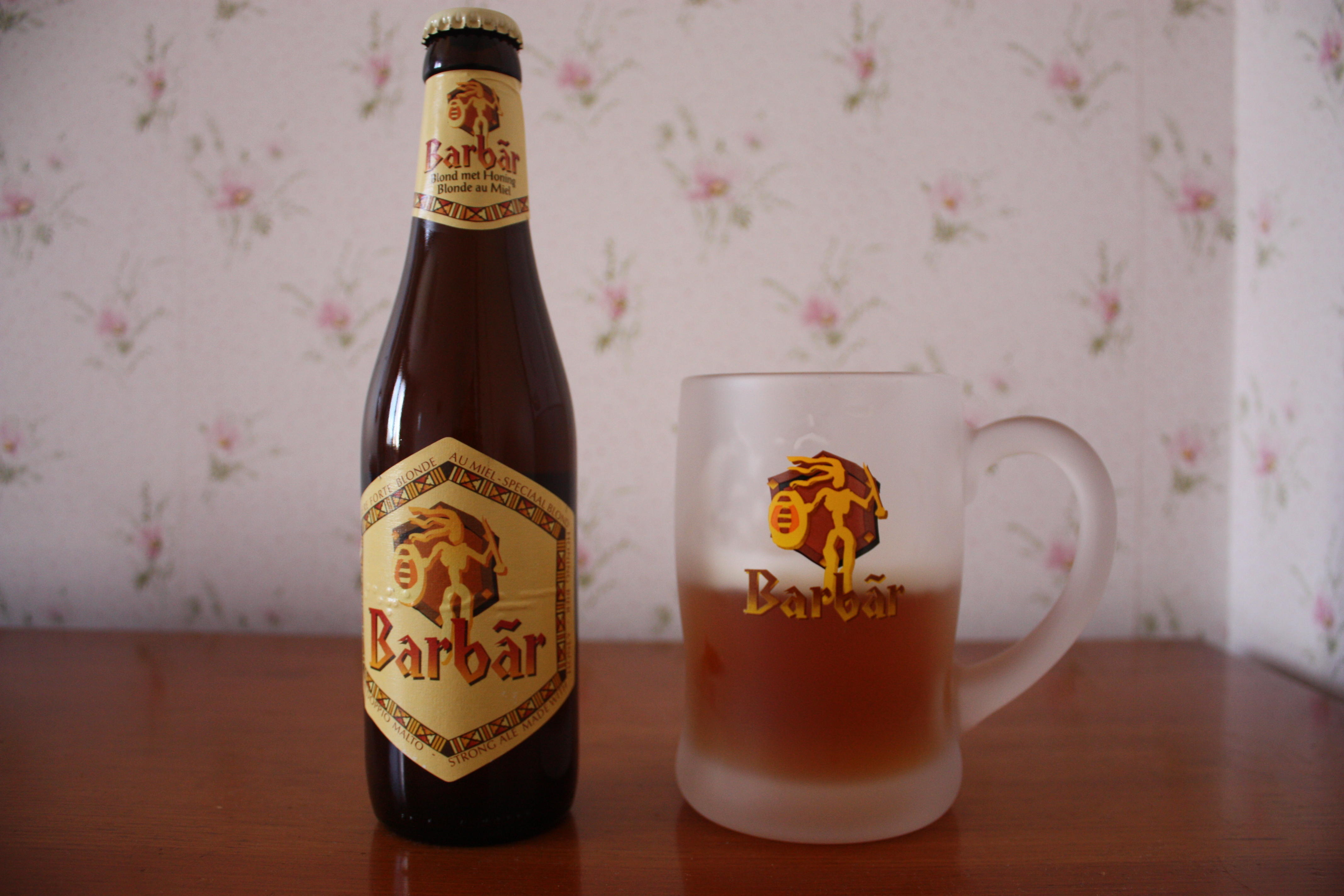 Bouteille et boc de bière de la Barbãr